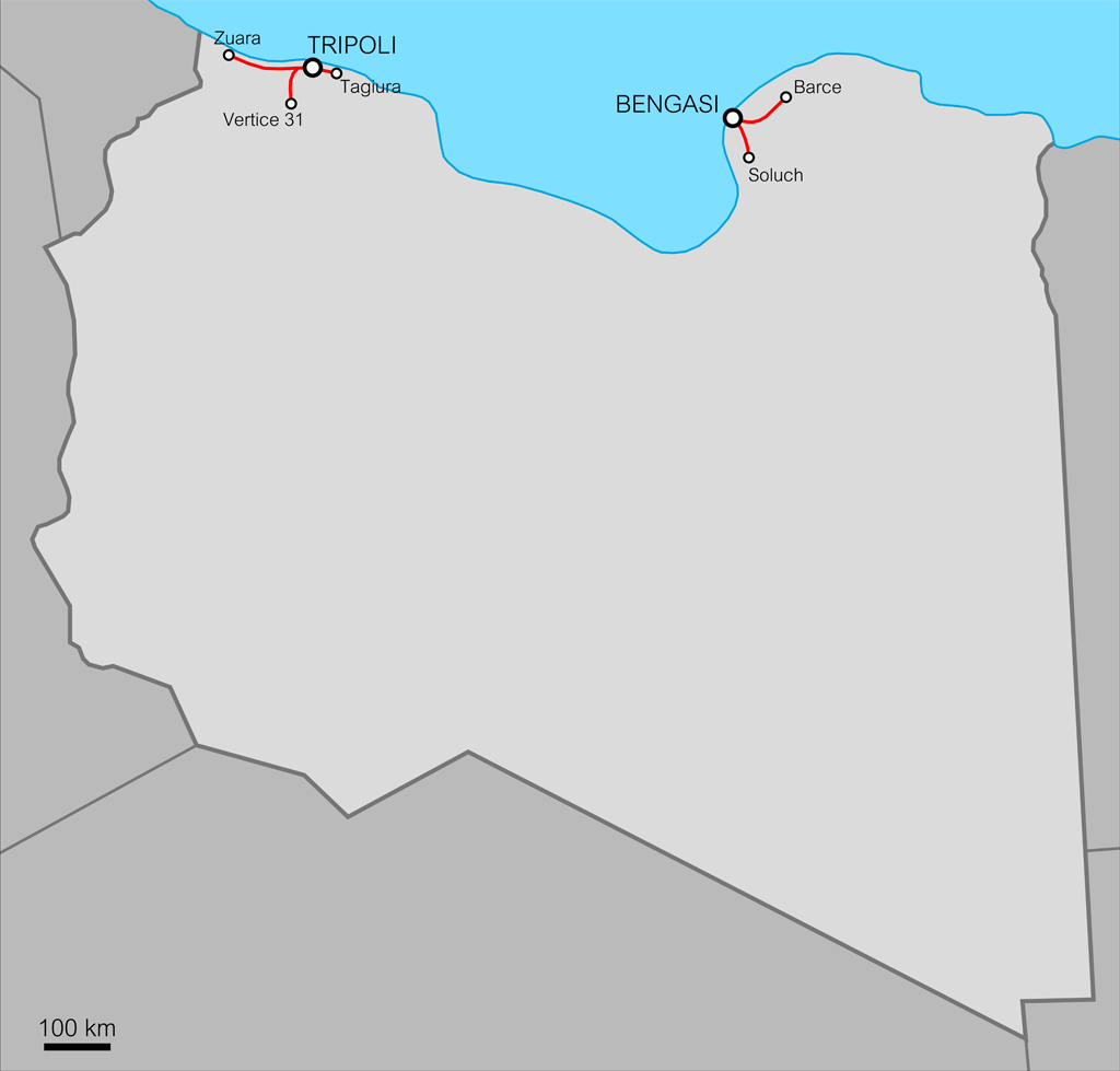 La rete ferroviaria della Libia Italiana